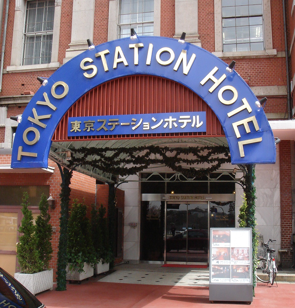 TOKYO STATION HOTEL entrance